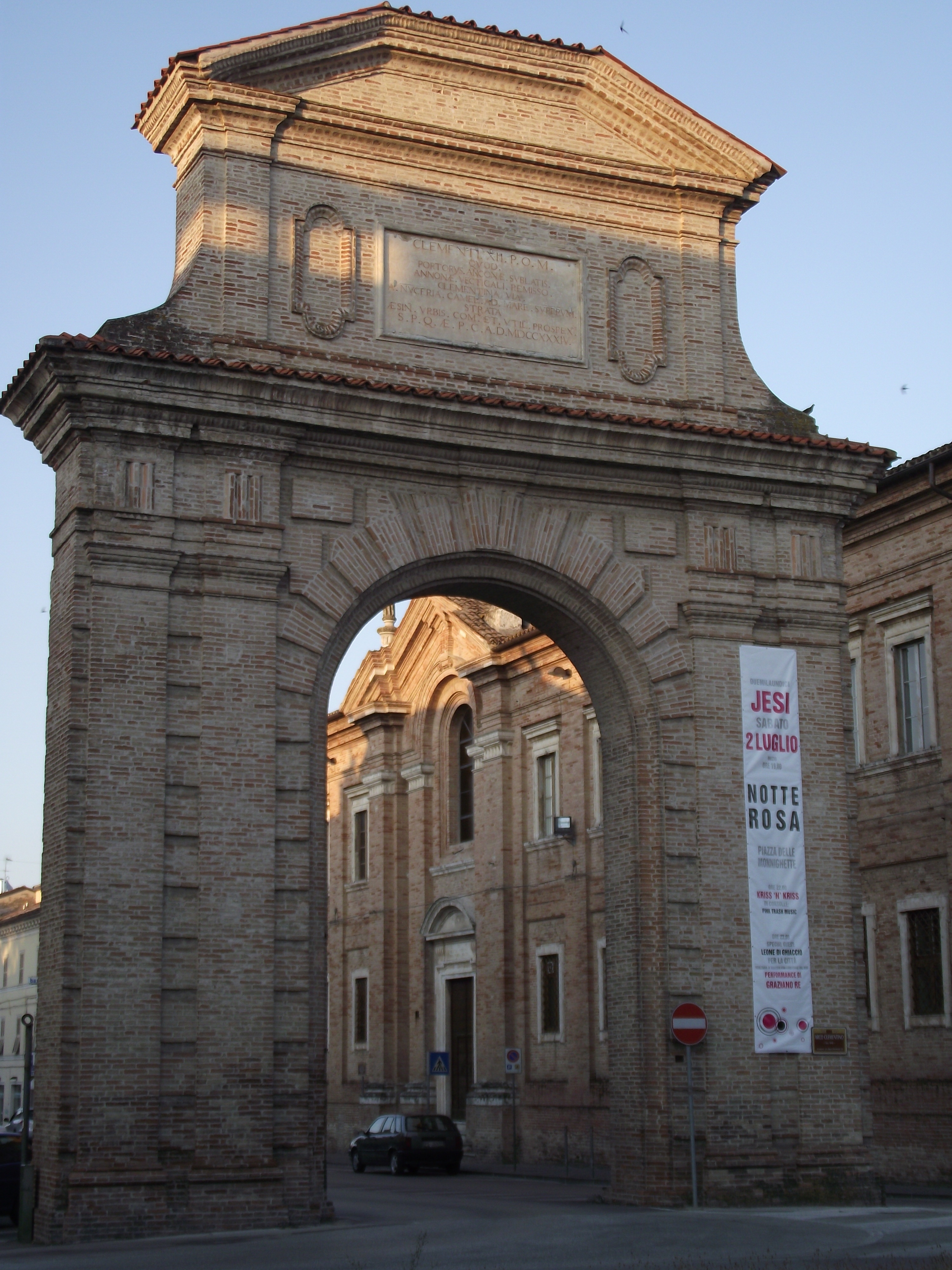 Jesi, Arco Clementino, D.Valeri, 1734